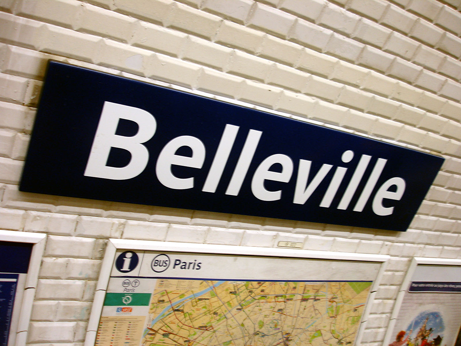 Panneau de la station Belleville de la ligne 2 du métro de Paris, France